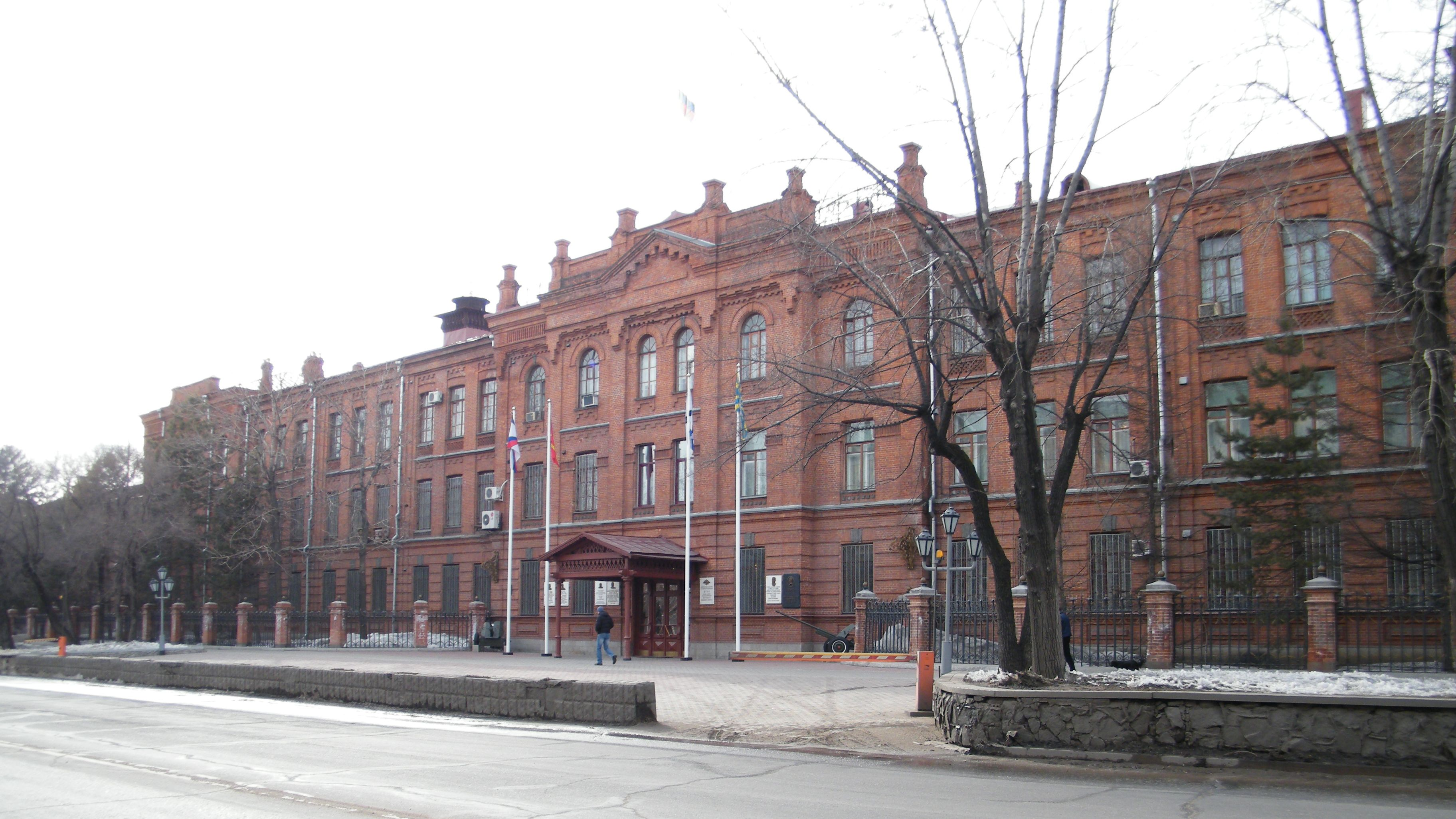 Штаб ДВО